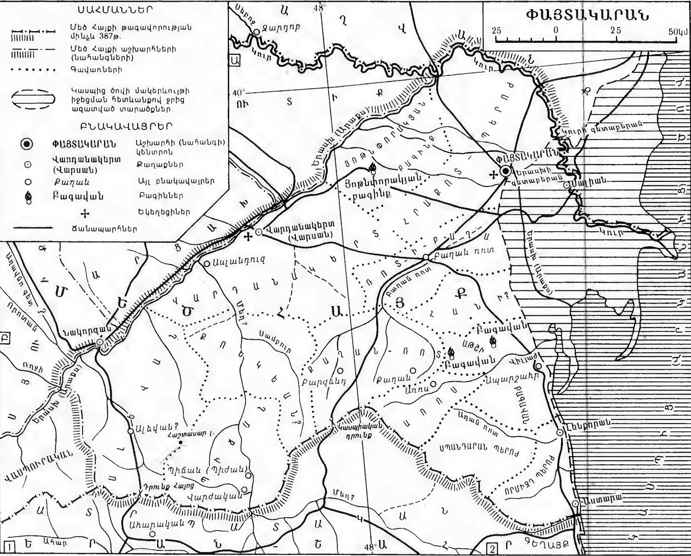 Փայտակարան Նահանգ